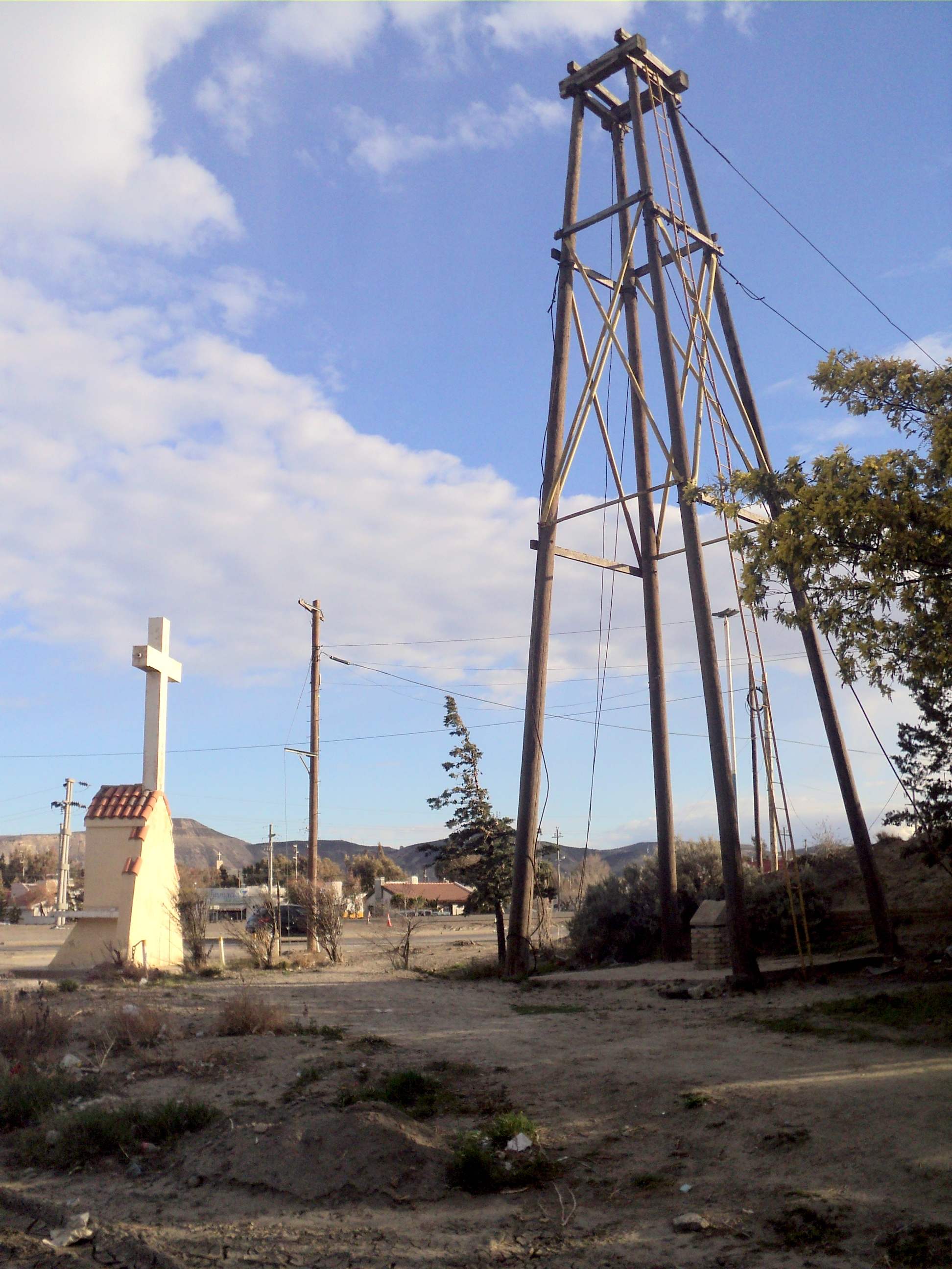 Lugar dodne se situó la parada Gasoducto